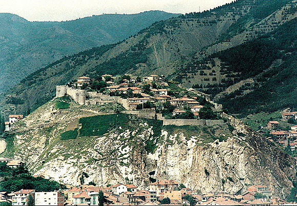 Ön cepheden Kale ve İskilip.